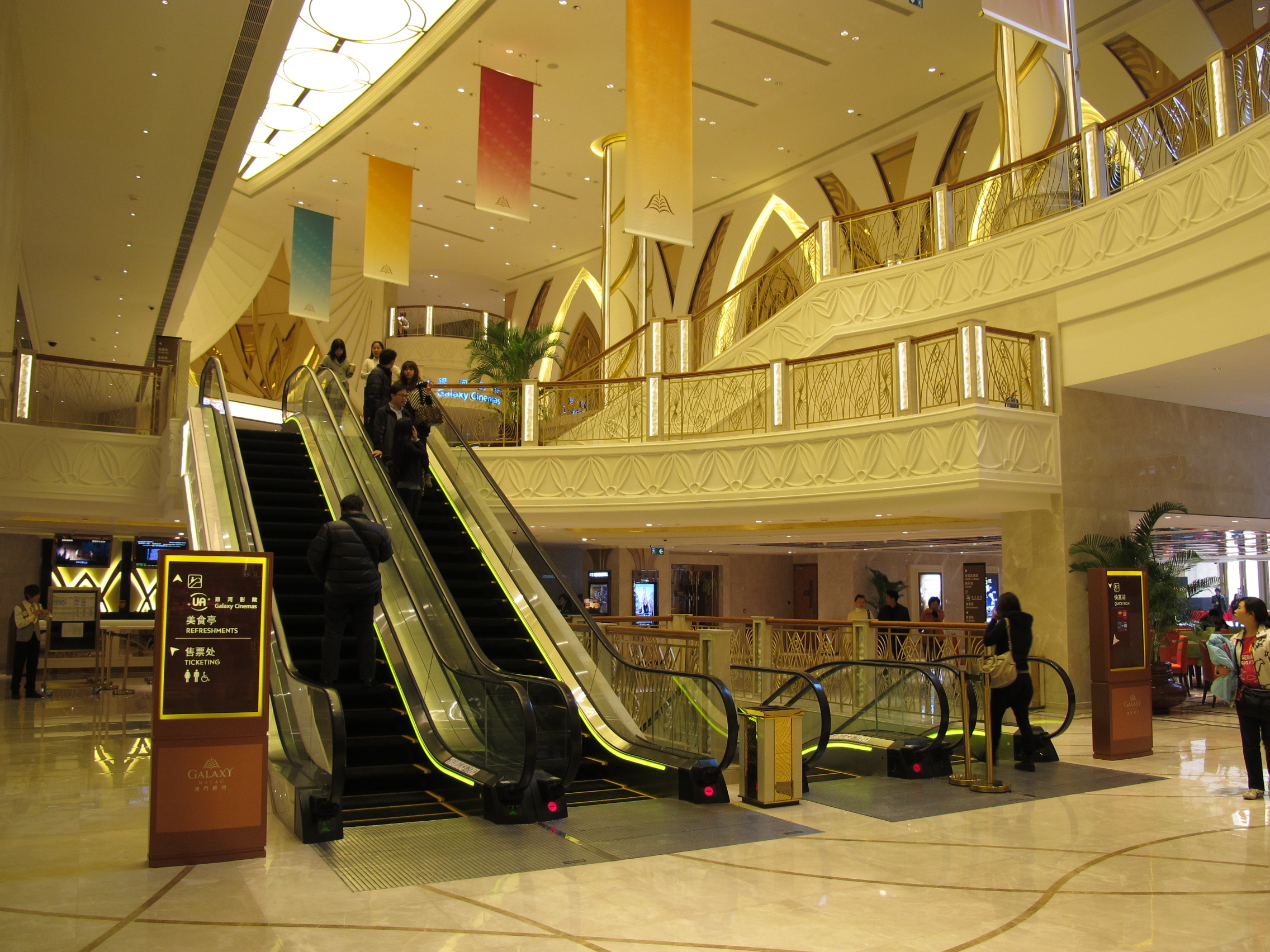 UA Galaxy Macau